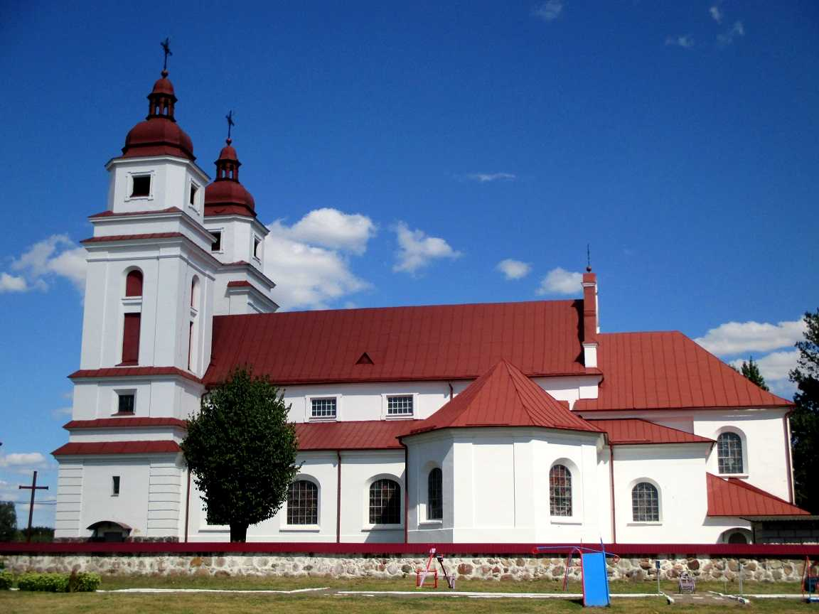 Касцёл Перамянення Гасподняга, Ваверка